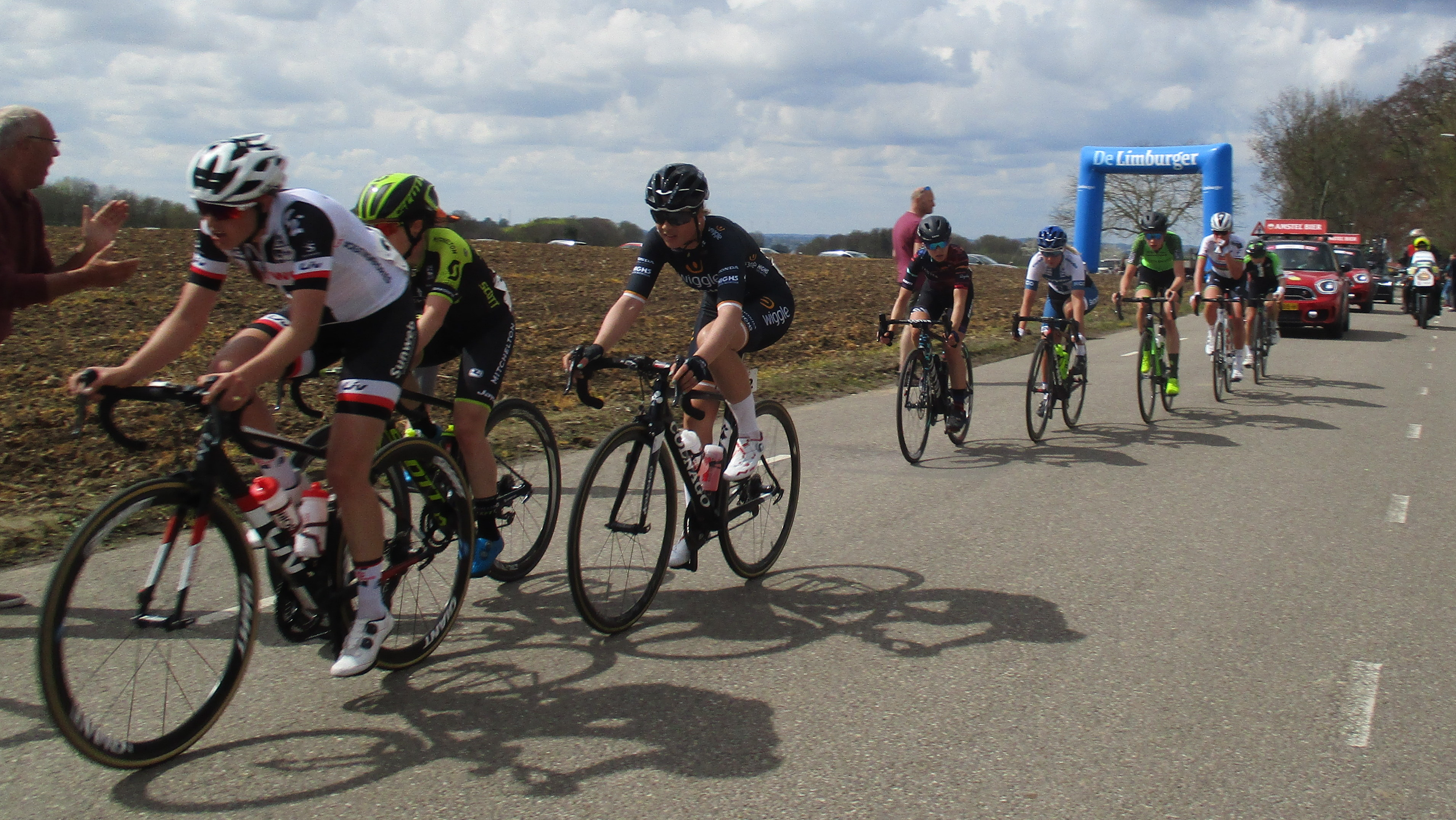 2e doorkomst Gasthuis in de Amstel Gold Race Ladies Edition 2018.